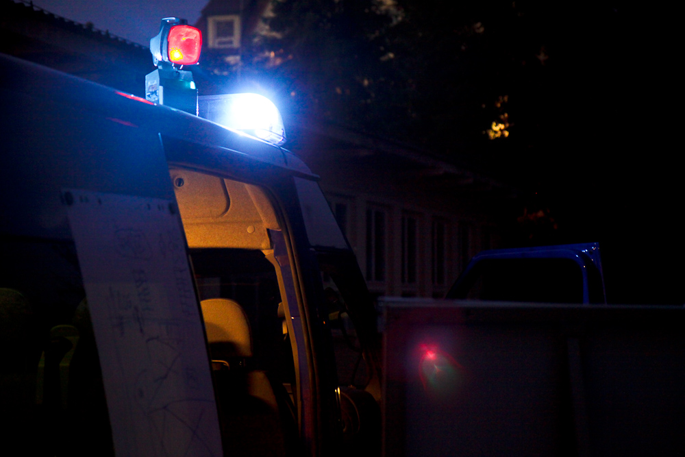 Einsatzleitung - bei einer Übung auf dem ehemaligen Edelmann-Areal in Heidenheim